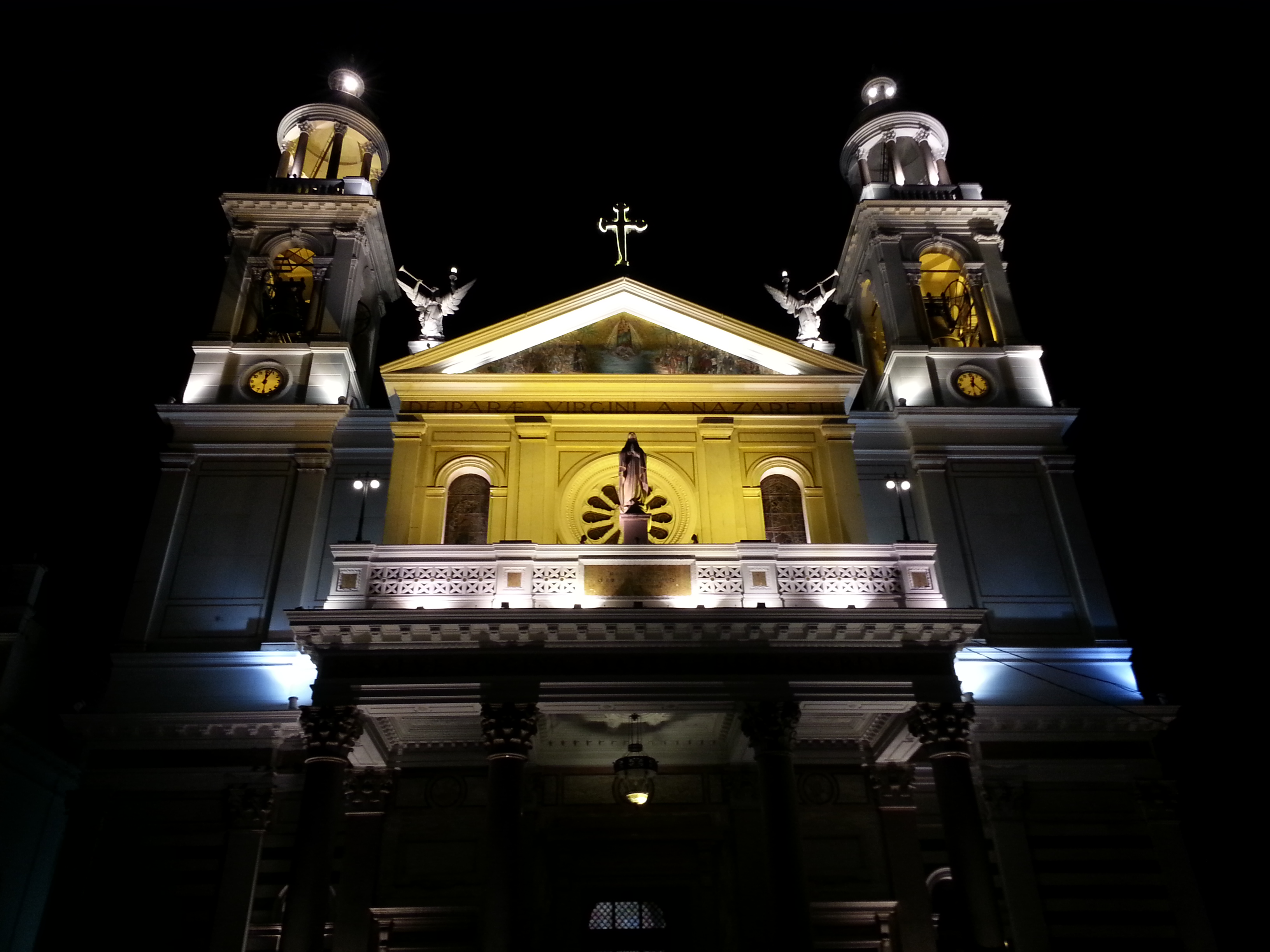 A Basílica de Nossa Senhora de Nazaré, única Basílica da Amazônia Brasileira, fica na cidade de Belém, capital do estado do Pará.